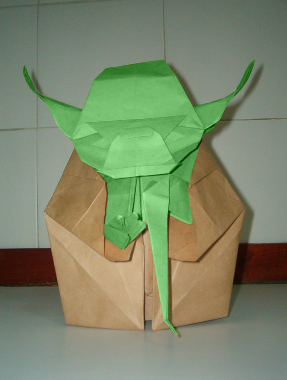 Master Yoda - origami.